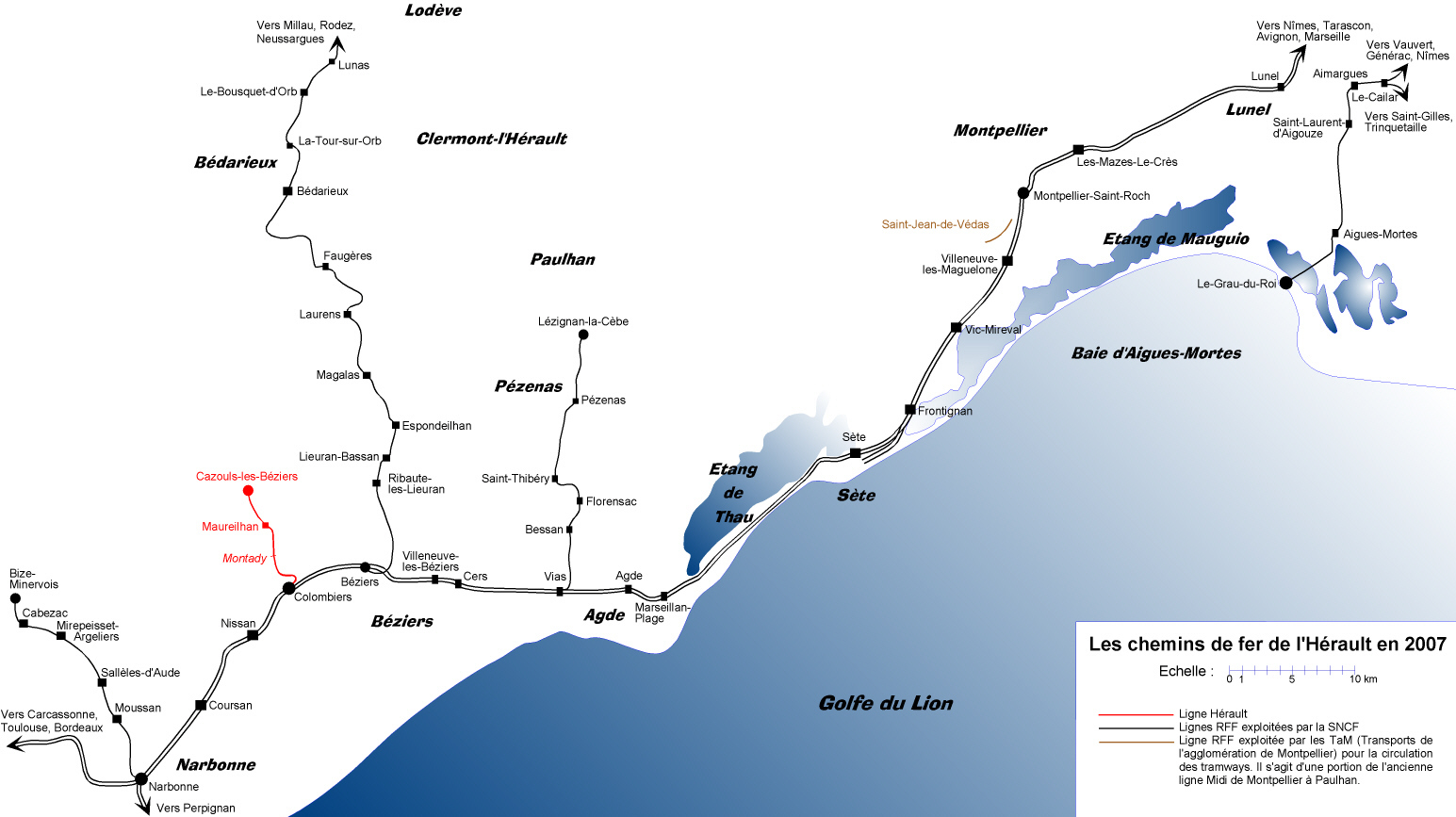 Chemins de fer de l'Hérault - Carte de la situation en 2007.